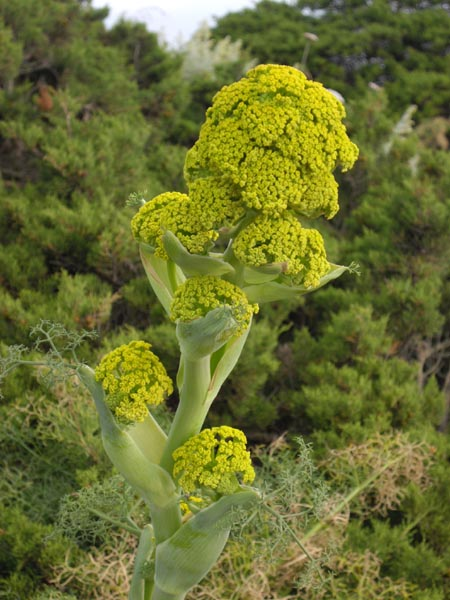 Ferula communis